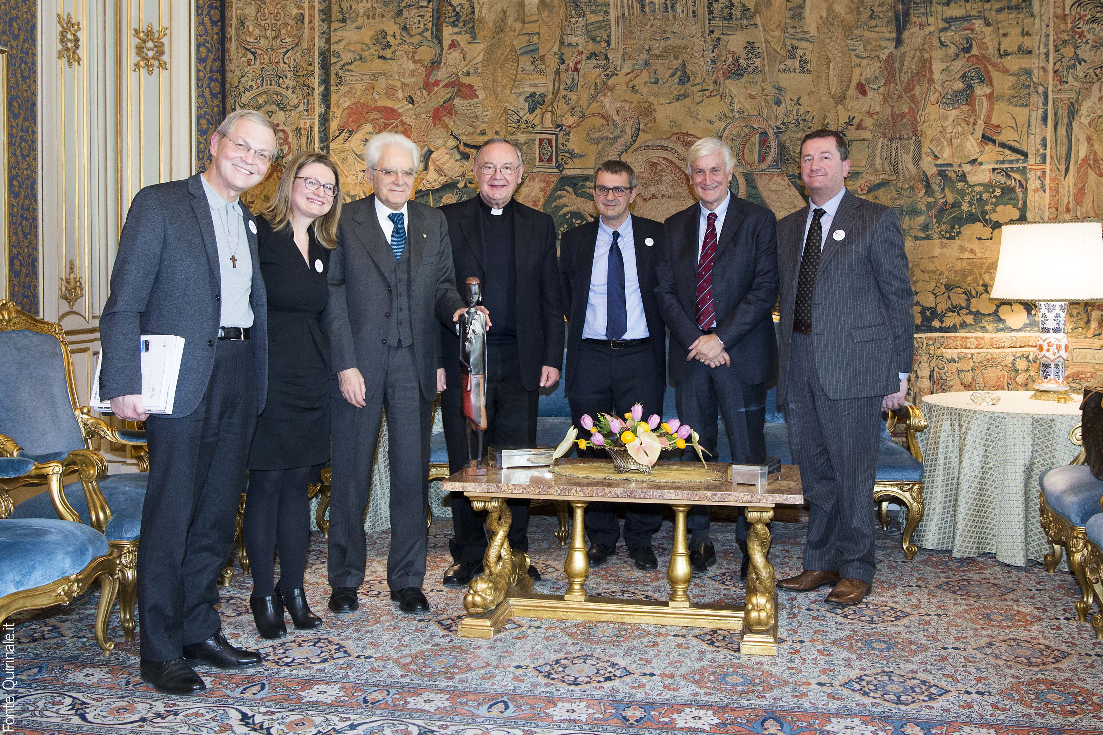 L'incontro con il Presidente Mattarella Roma, 19 gennaio 2016 - La delegazione Cuamm e il Presidente della Repubblica Sergio Mattarella